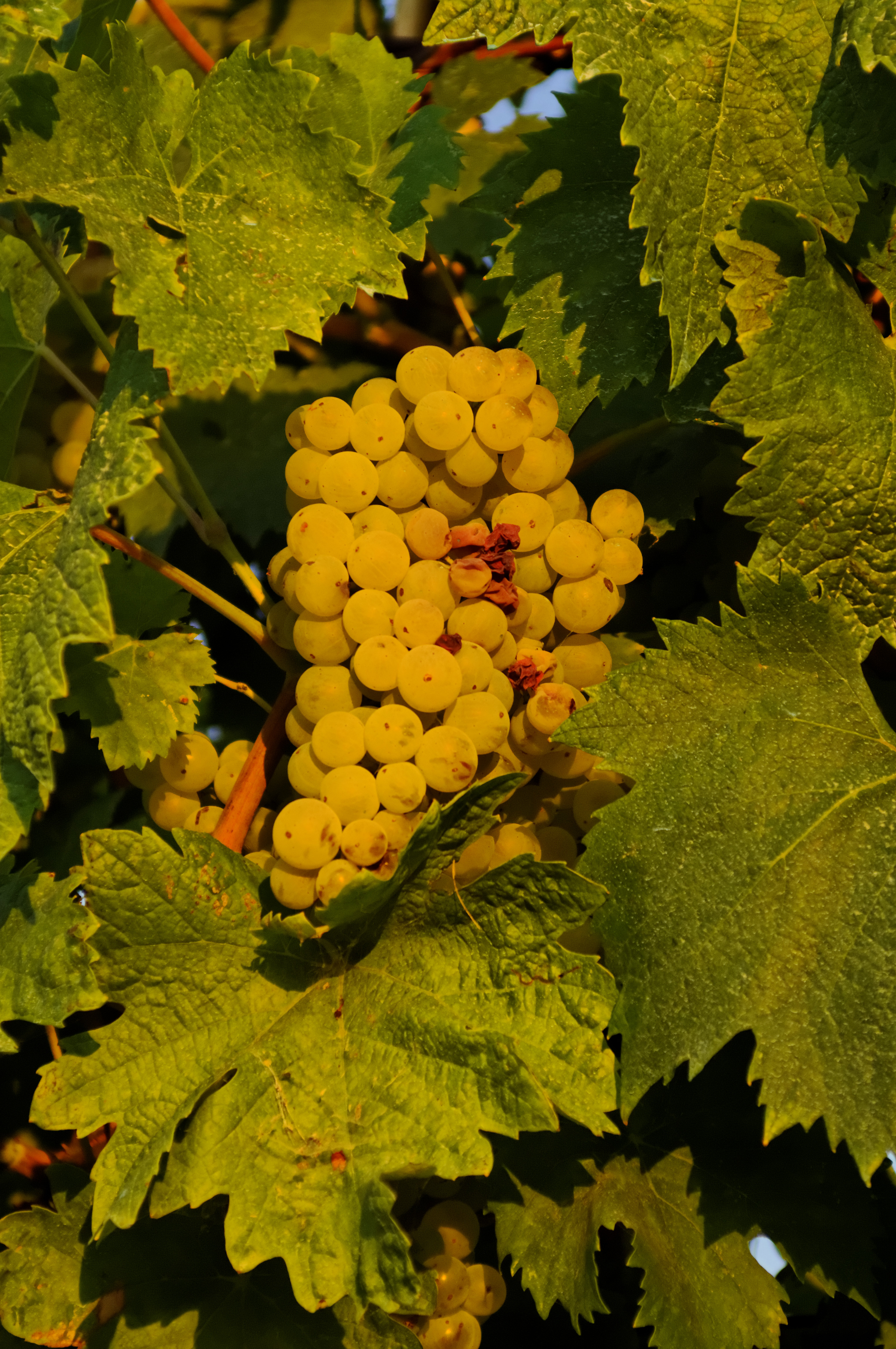 From author "Une grappe du cépage Verdicchio, prise aux premières lueurs du jour, dans la campagne des Marches, à la fin du mois d'août. La maturité est proche et l'on voit bien l'abondance de grains sur cette vigne qui semblait menée avec une certaine prudence quant aux traitements chimiques, mais un certain laisser aller, en ce qui concerne les soins apportés à la plante."